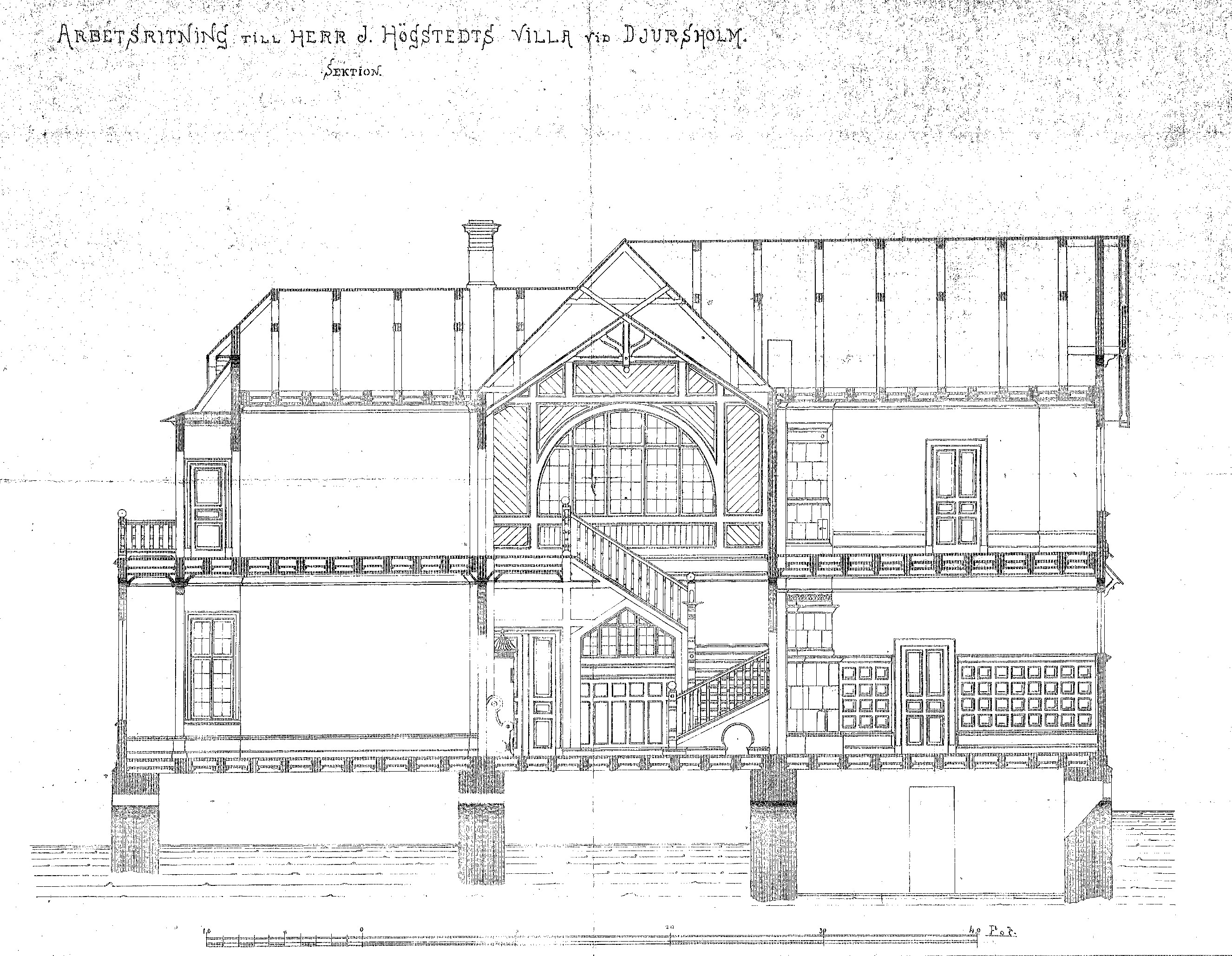 Villa Ugglebo, sektion